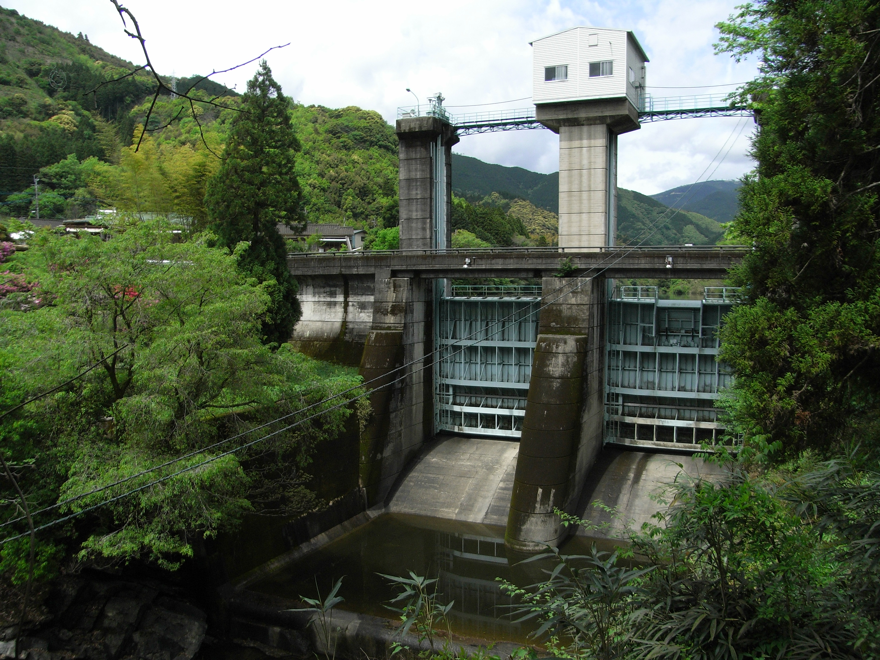 Dam